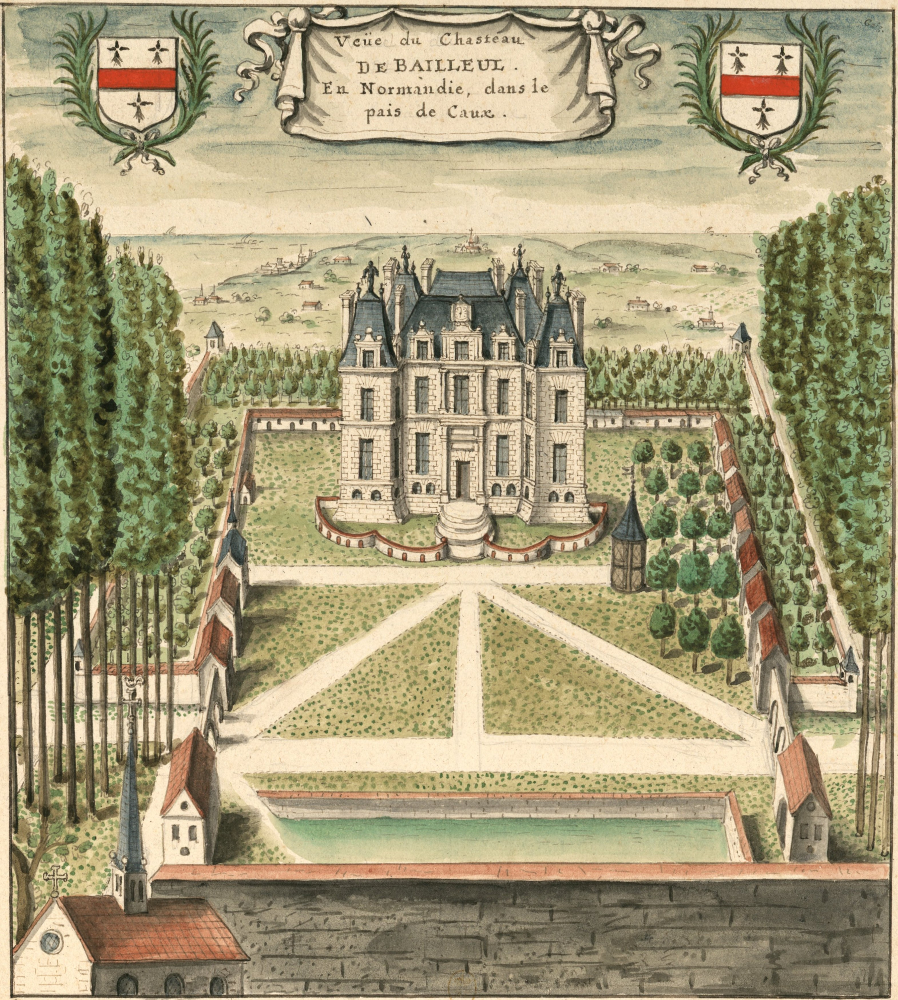 Aquarell des Schloss Bailleul in der Normandie